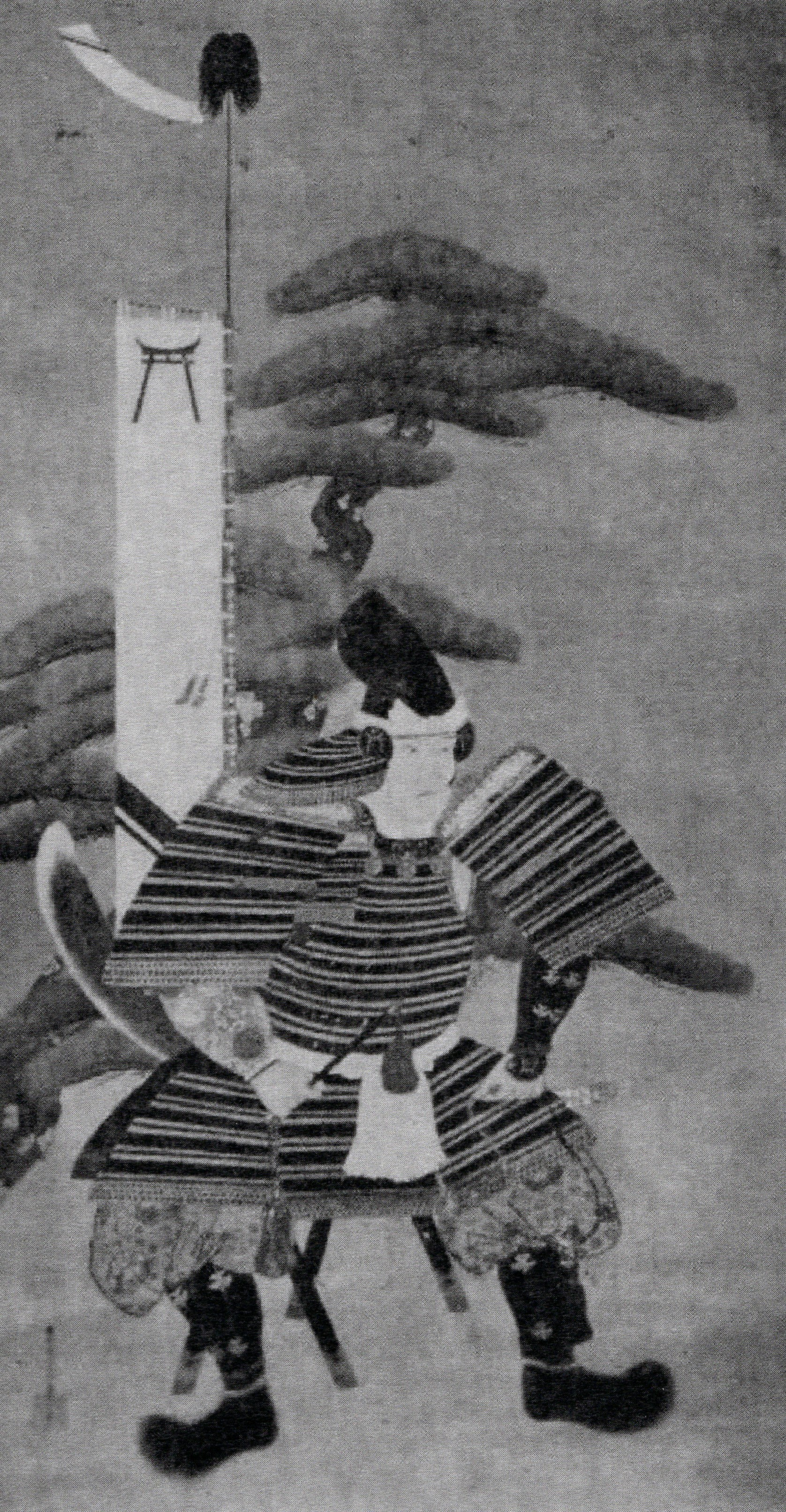 下総矢作藩、陸奥磐城平藩、出羽国山形藩主・鳥居忠政の肖像画。